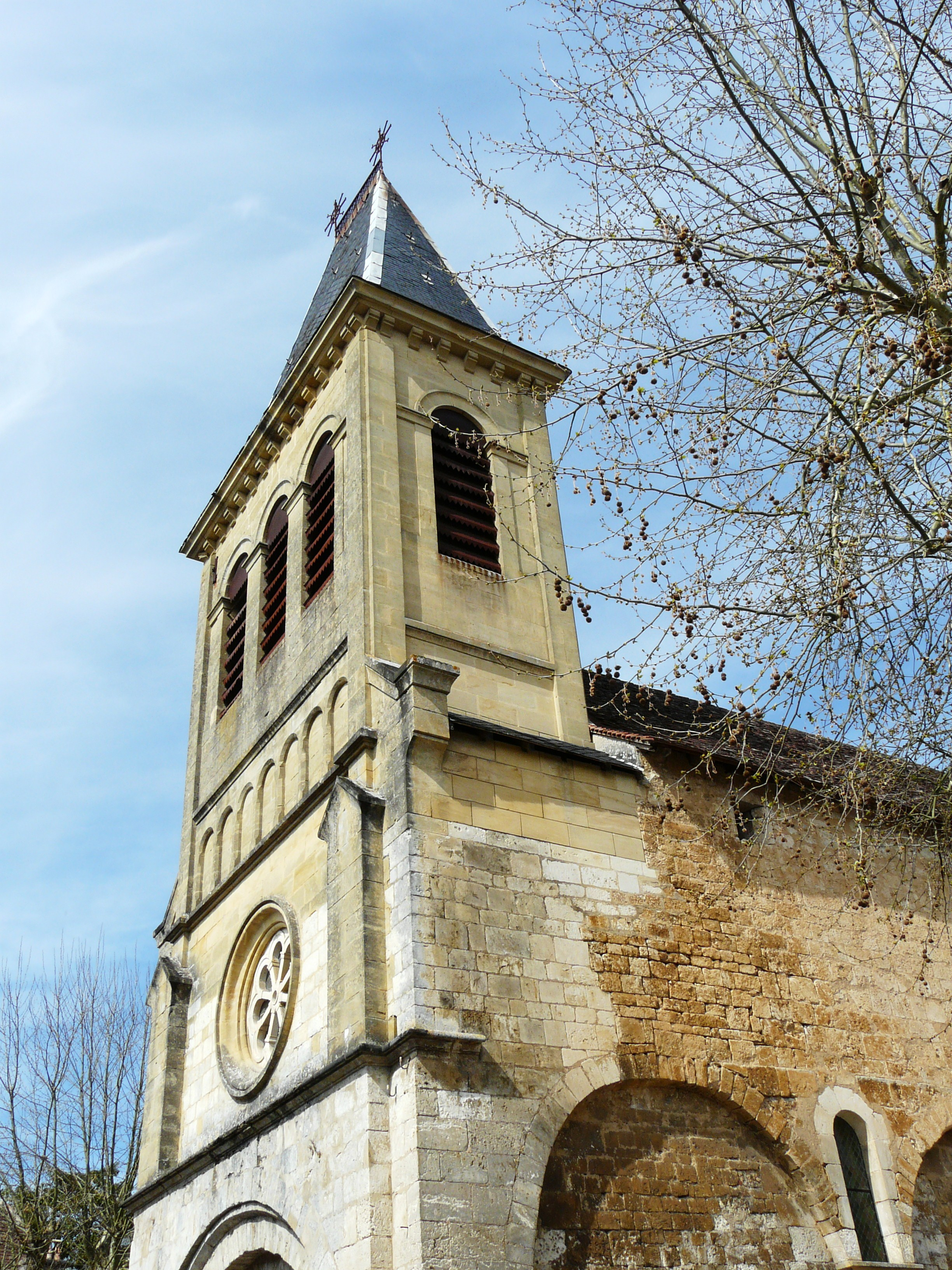 L'angle sud-ouest du clocher de l'église Notre-Dame de l'Assomption, Lamonzie-Montastruc, Dordogne, France.